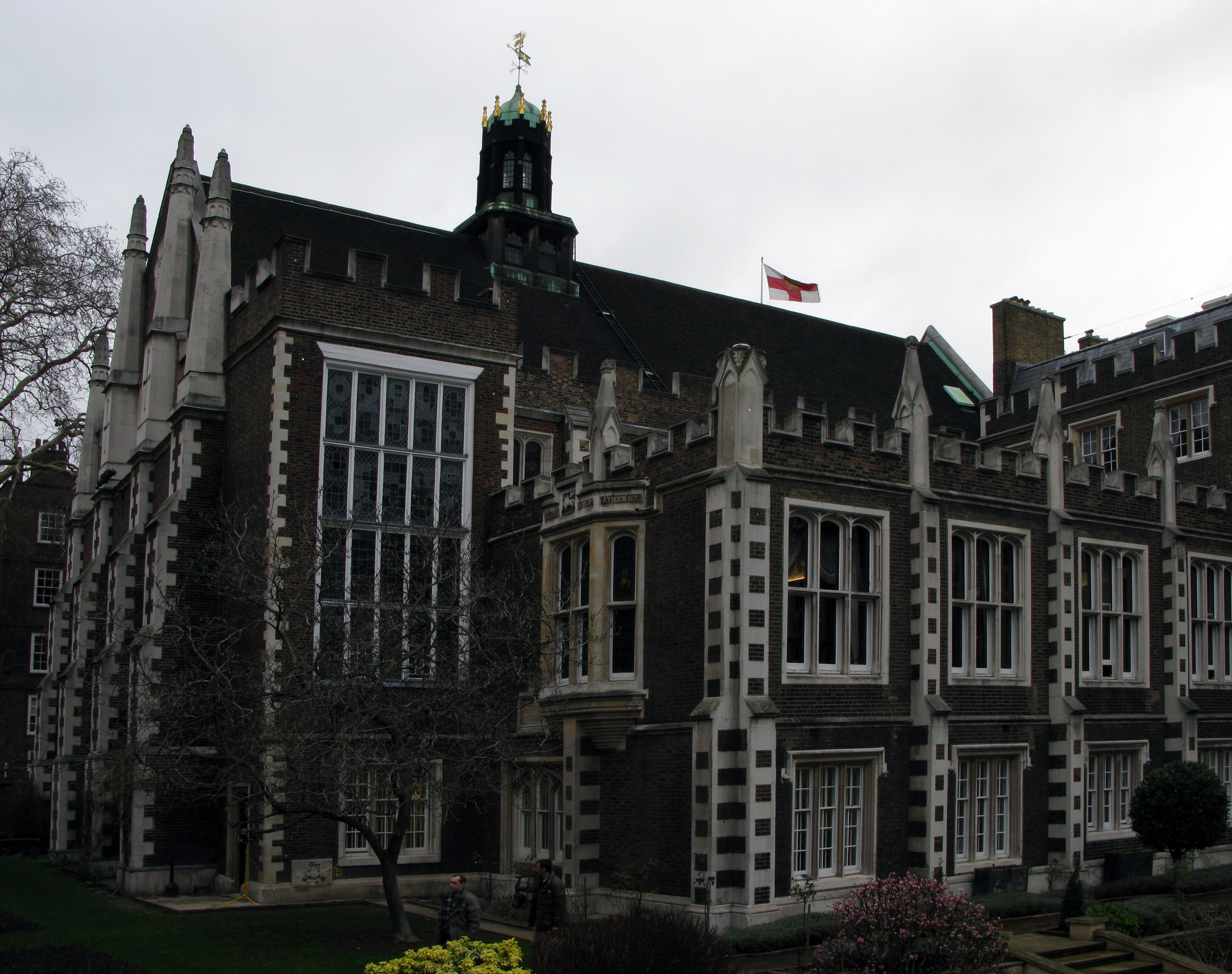 Middle Temple Hall